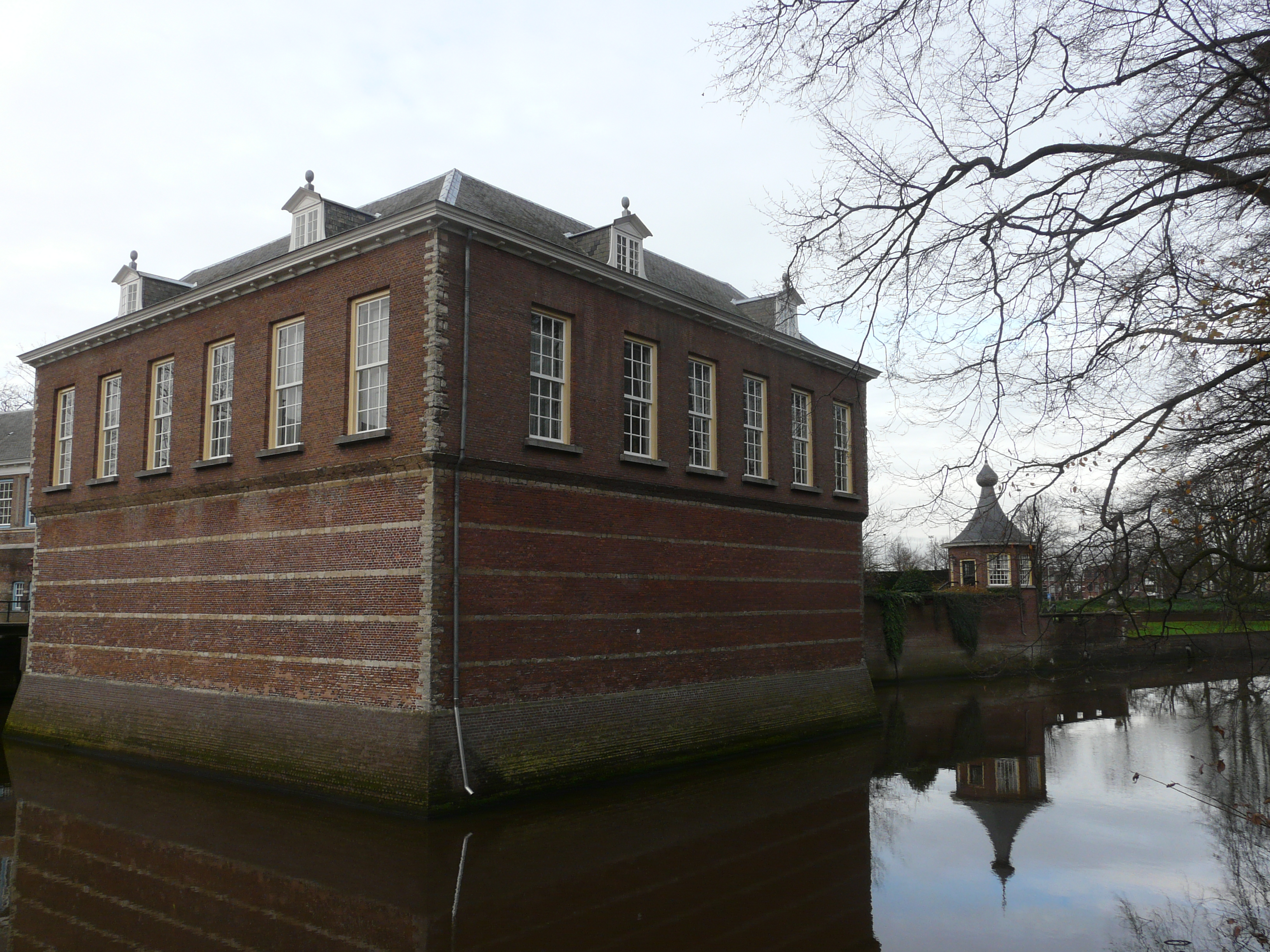 "Blockhaus" (eigentl. Turmhaus) des Castels von Breda am Kasteelplein im Zentrum von Breda